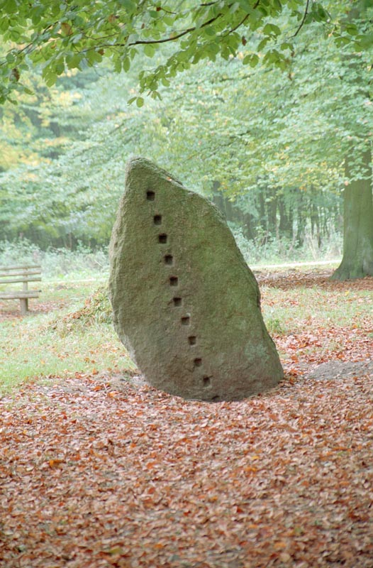 Brautlade des Boitiner Steintanz